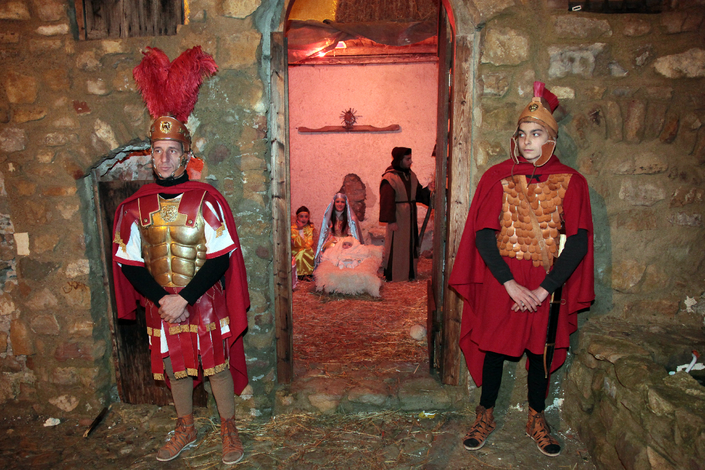 Presepe vivente a Caltanissetta il Natale 2013: centurioni davanti la grotta.